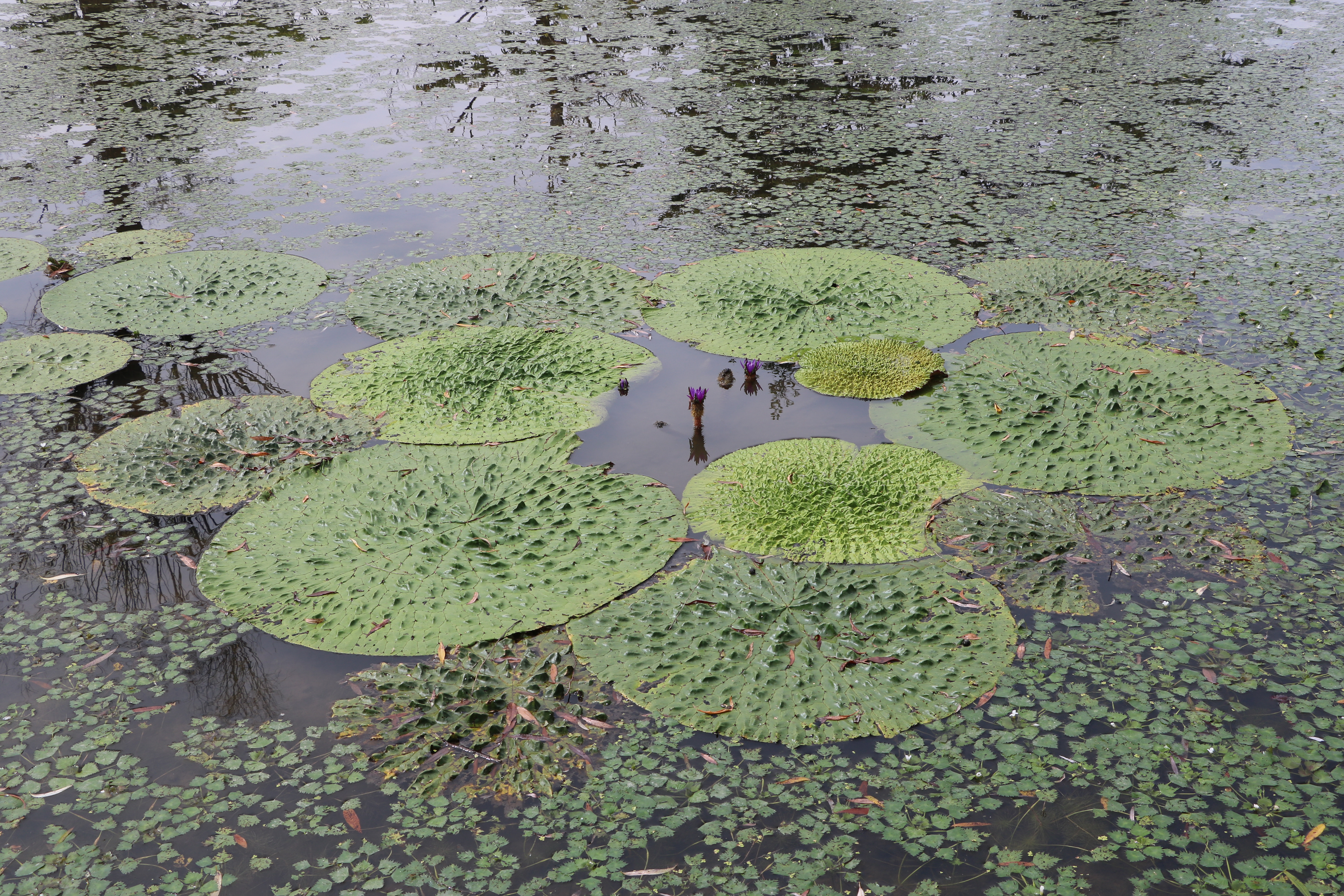 国指定天然記念物。十二町潟オニバス発生地（富山県氷見市）。